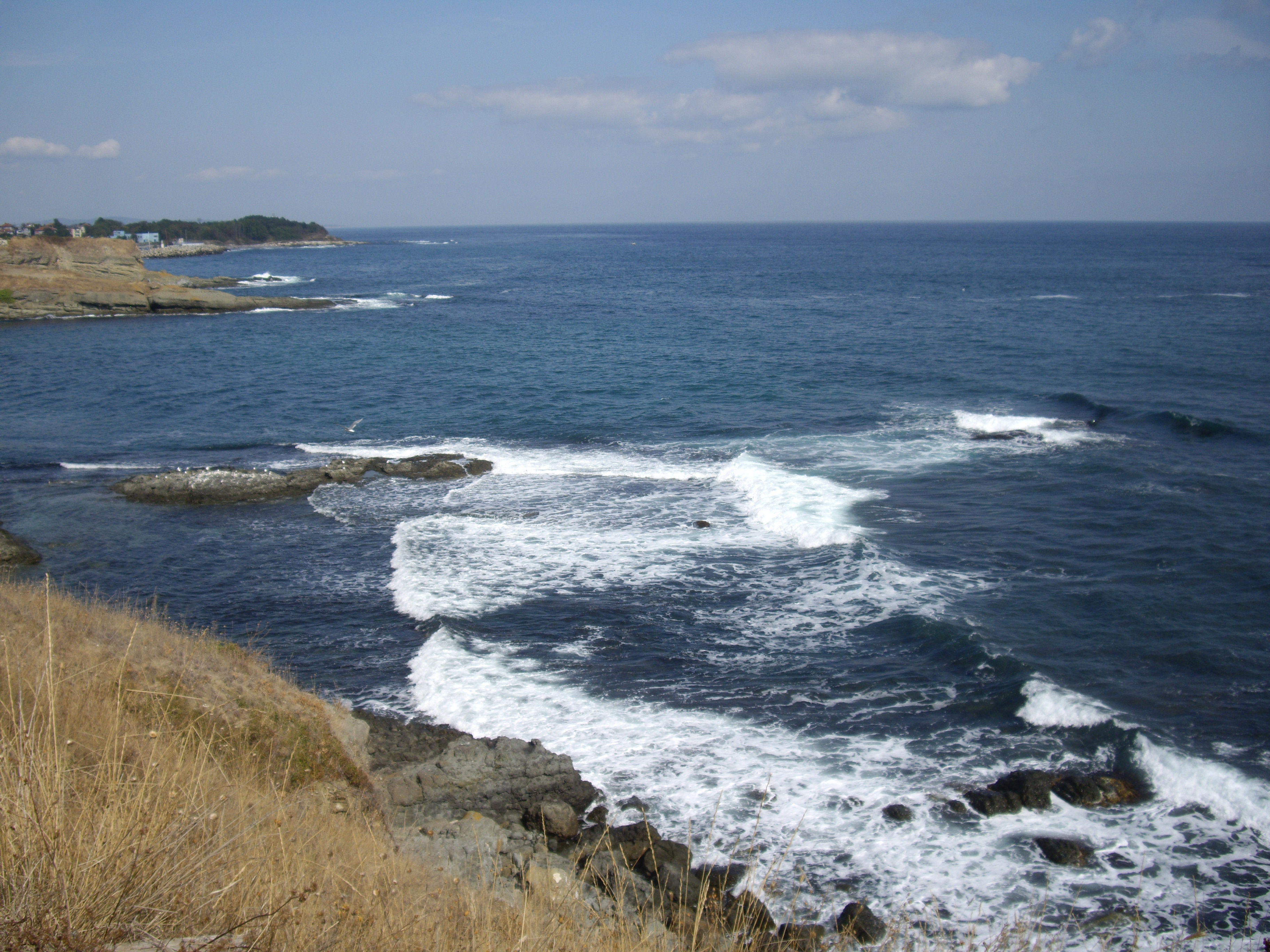 Странджа